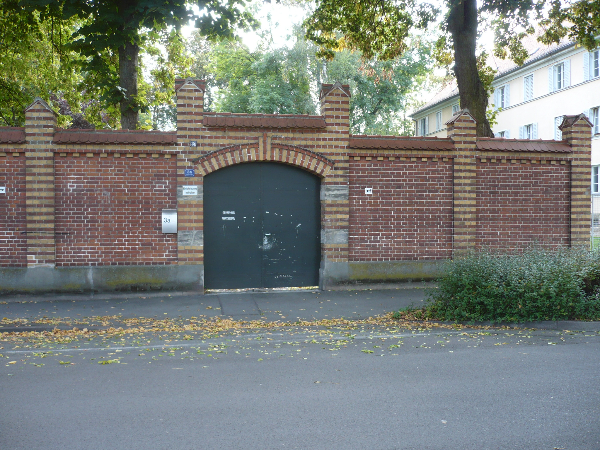 Tor zum Krankenstall für Pferde, Kasernenviertel Bayreuth